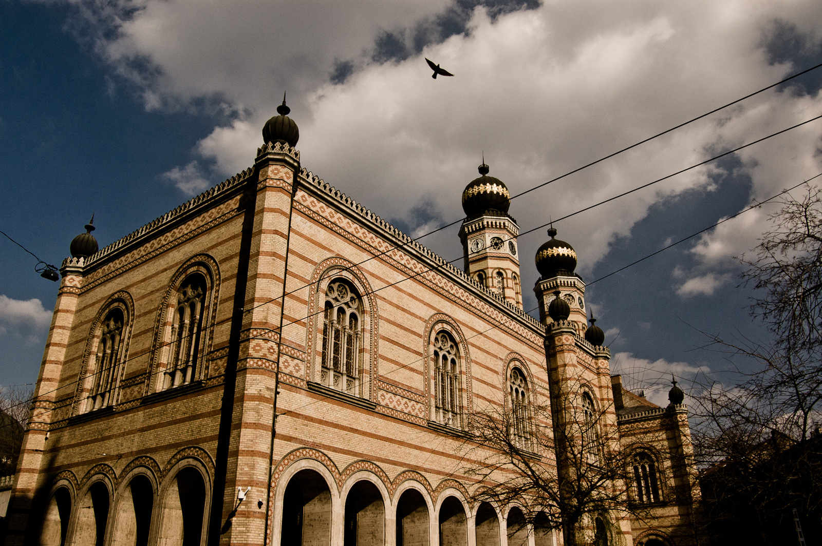 Zsinagóga (Budapest 7, Dohány utca 8.) This is a photo of a monument in Hungary, Identifier: 827